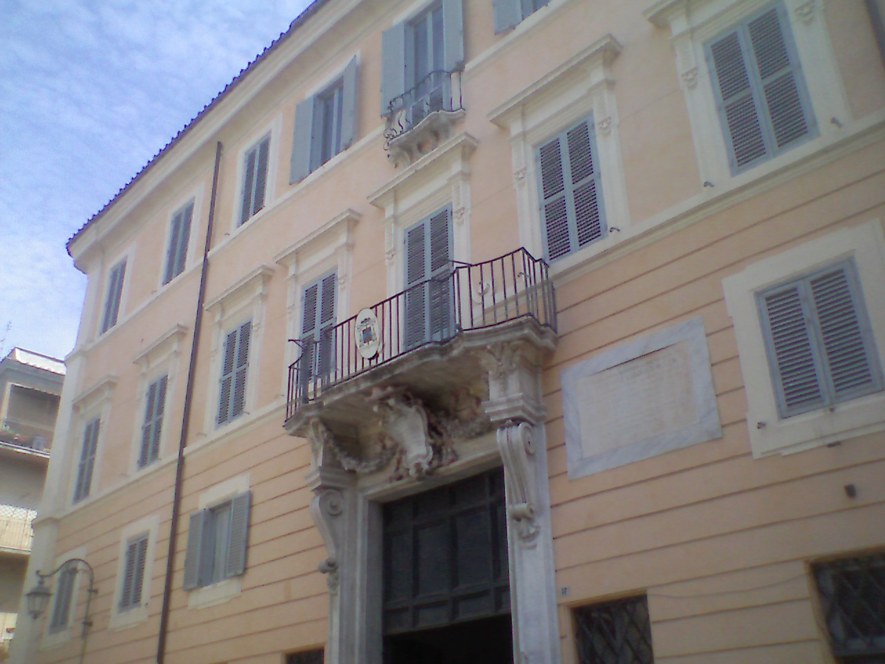 palazzo vescovile di Albano Laziale